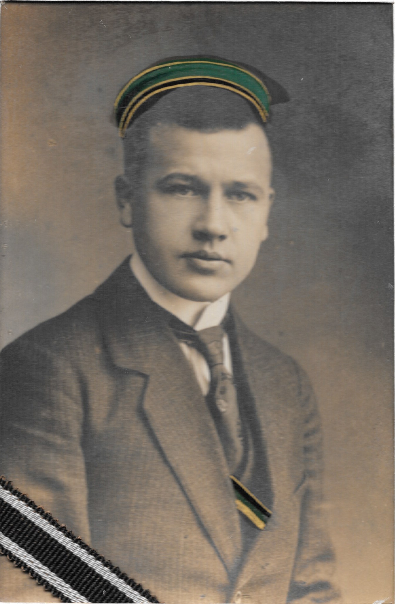 Werner Kyrieleis Porträt des Corps Teutonia-Hercynia